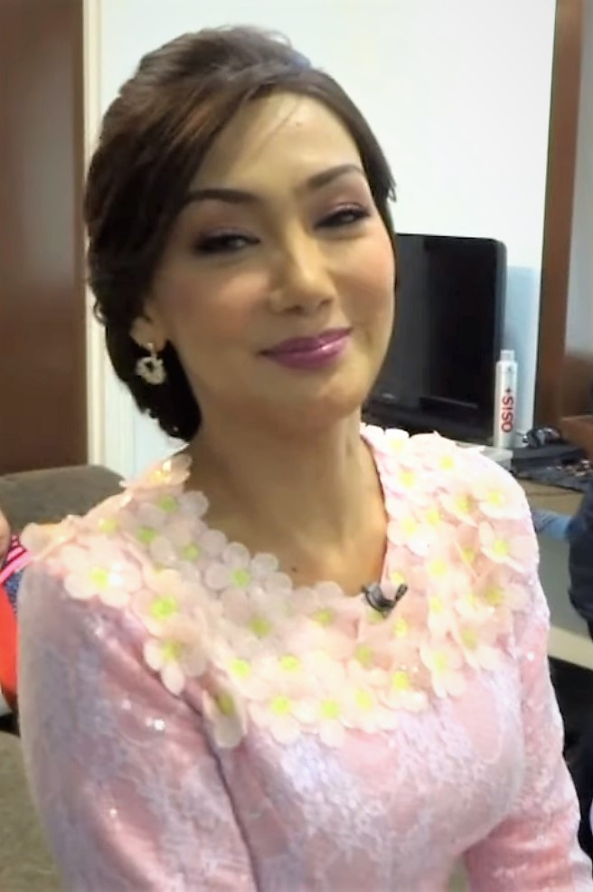 MeleTOP Throwback Raya - Beraya Cara Erra Fazira [05.08.2014] Kalau uolls nak beraya style, Erra Fazira, korang kena tahu juadah hari raya kegemaran Erra Fazira!